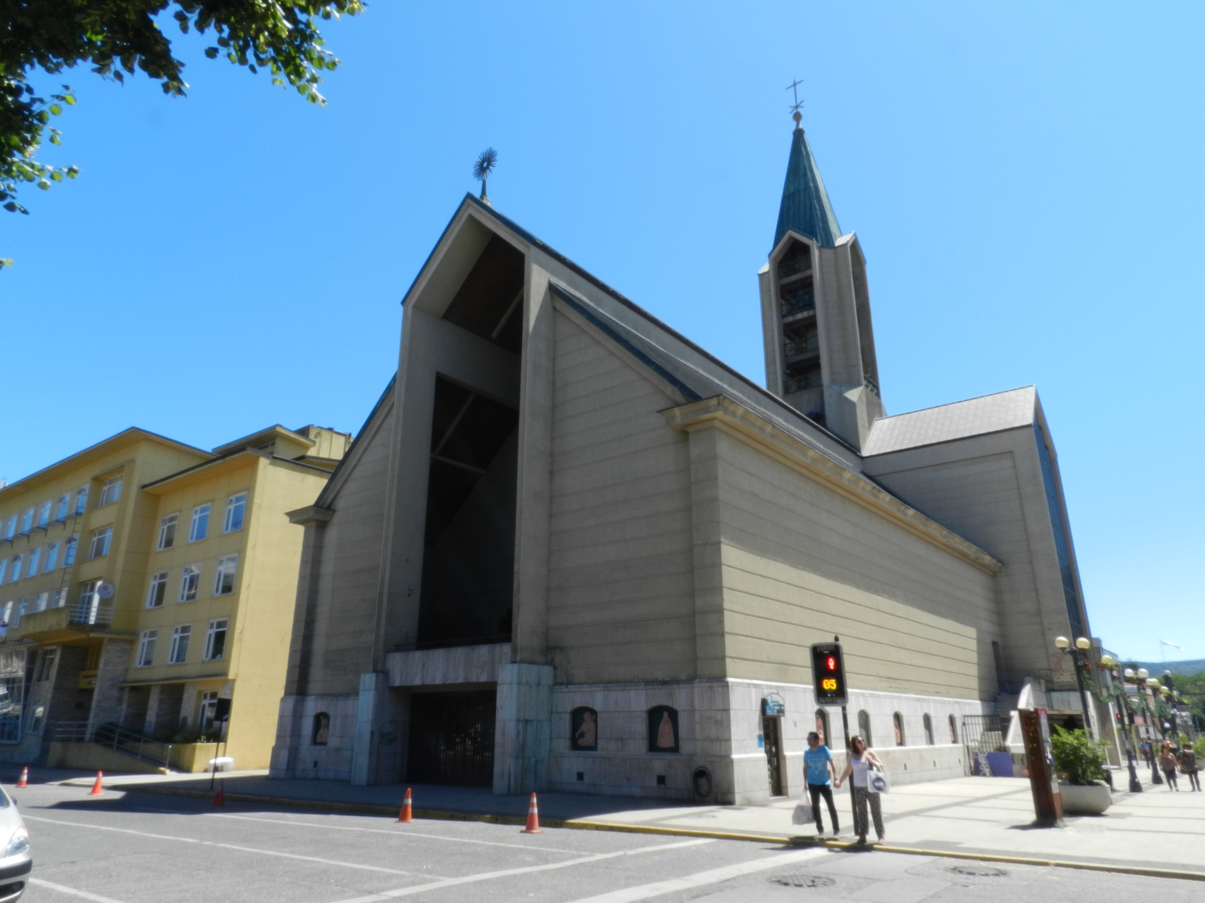 Catedral de Valdivia, Chile.